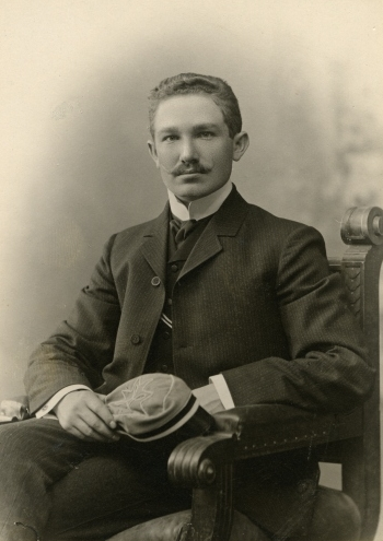 Jaak Varik, eesti vaimulik